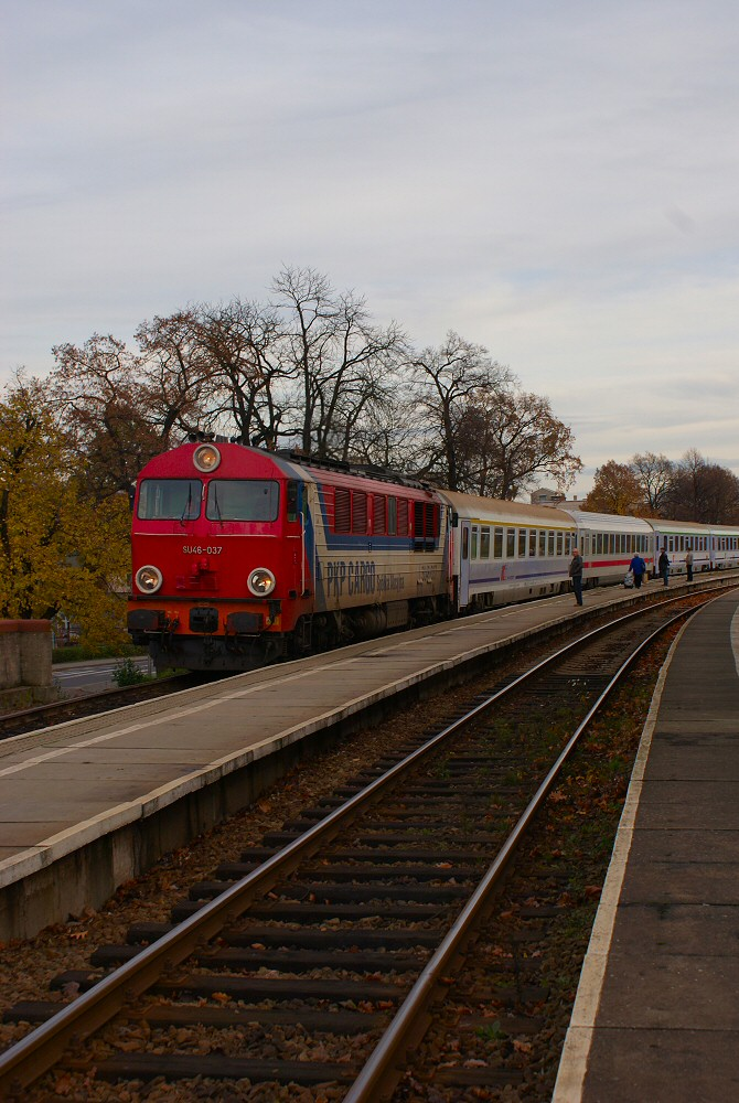 Pociąg EC Wawel z Krakowa do Hamburga na stacji Żary.